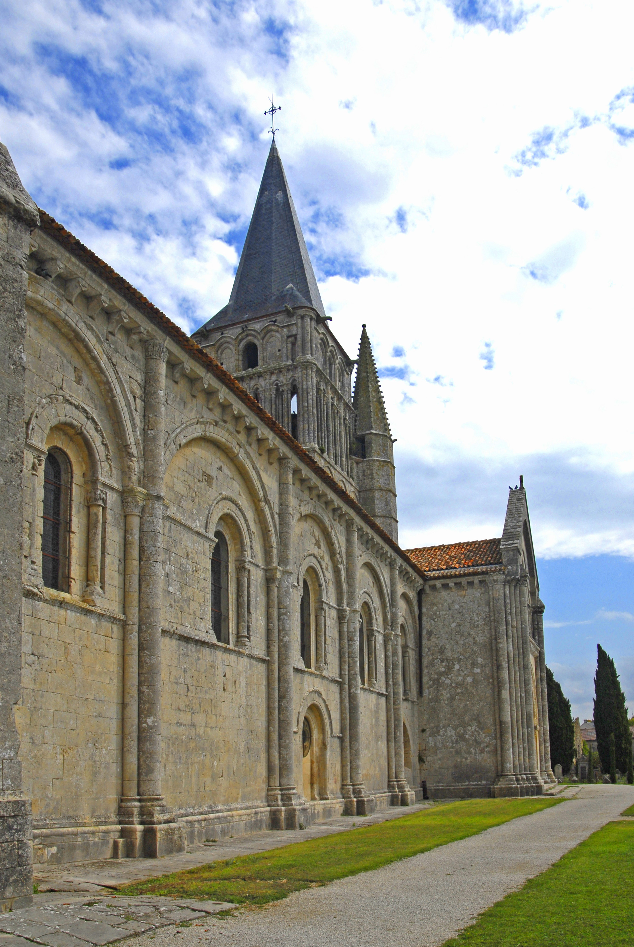 St.-Pierre Aulnay, Langhaus von SW